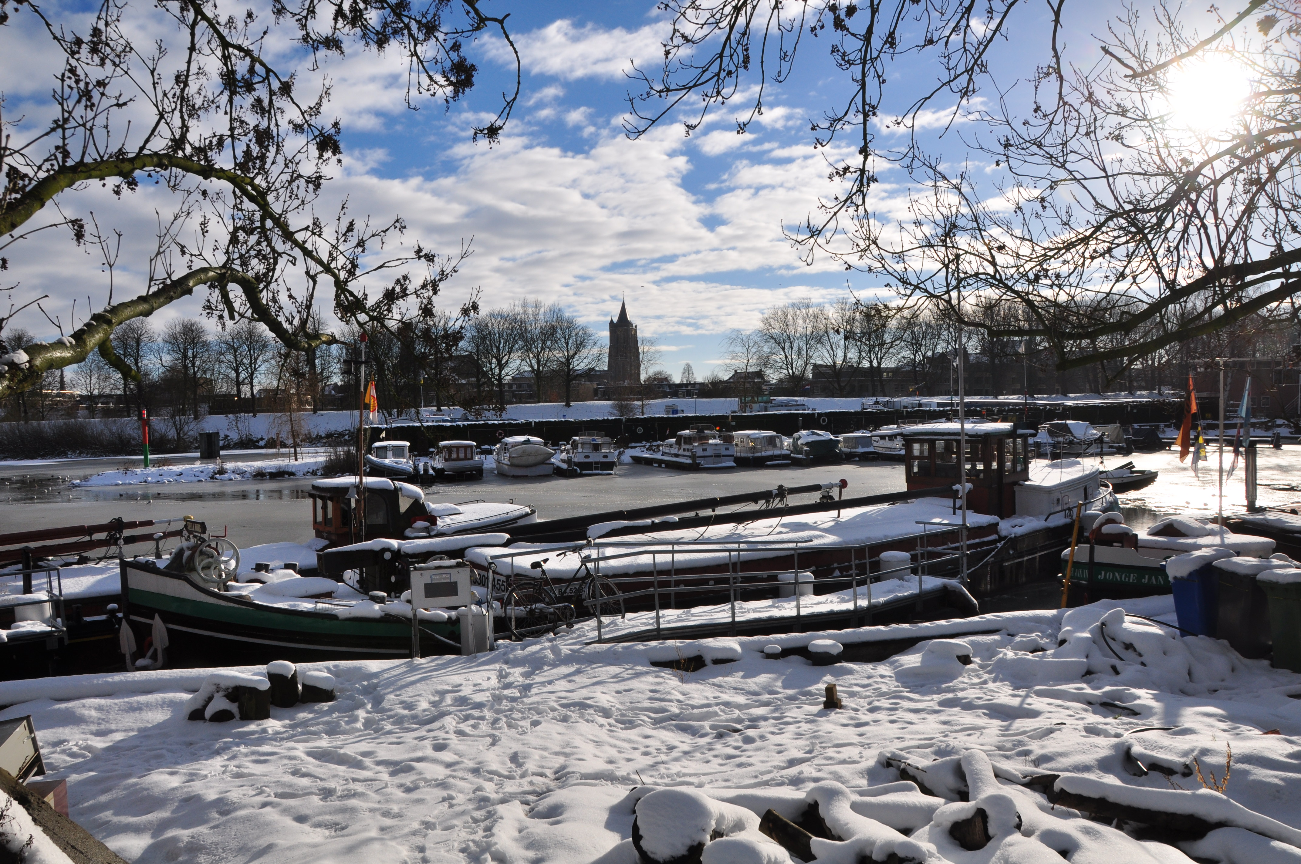 De Stella Maris onder de sneeuw op de ligplaats in Gorinchem